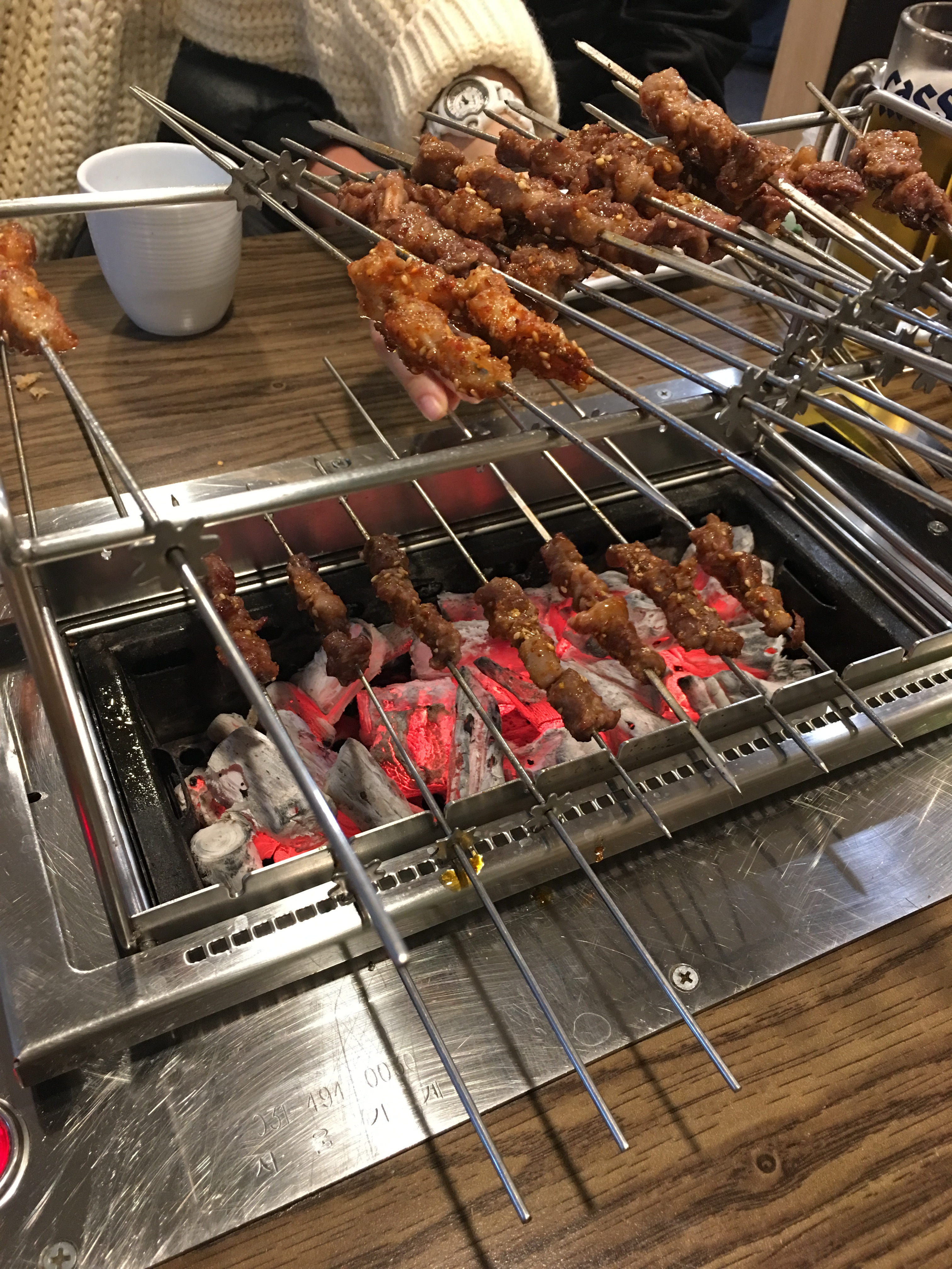 서울특별시 구로구 구로동의 식당에서 찍은 양꼬치